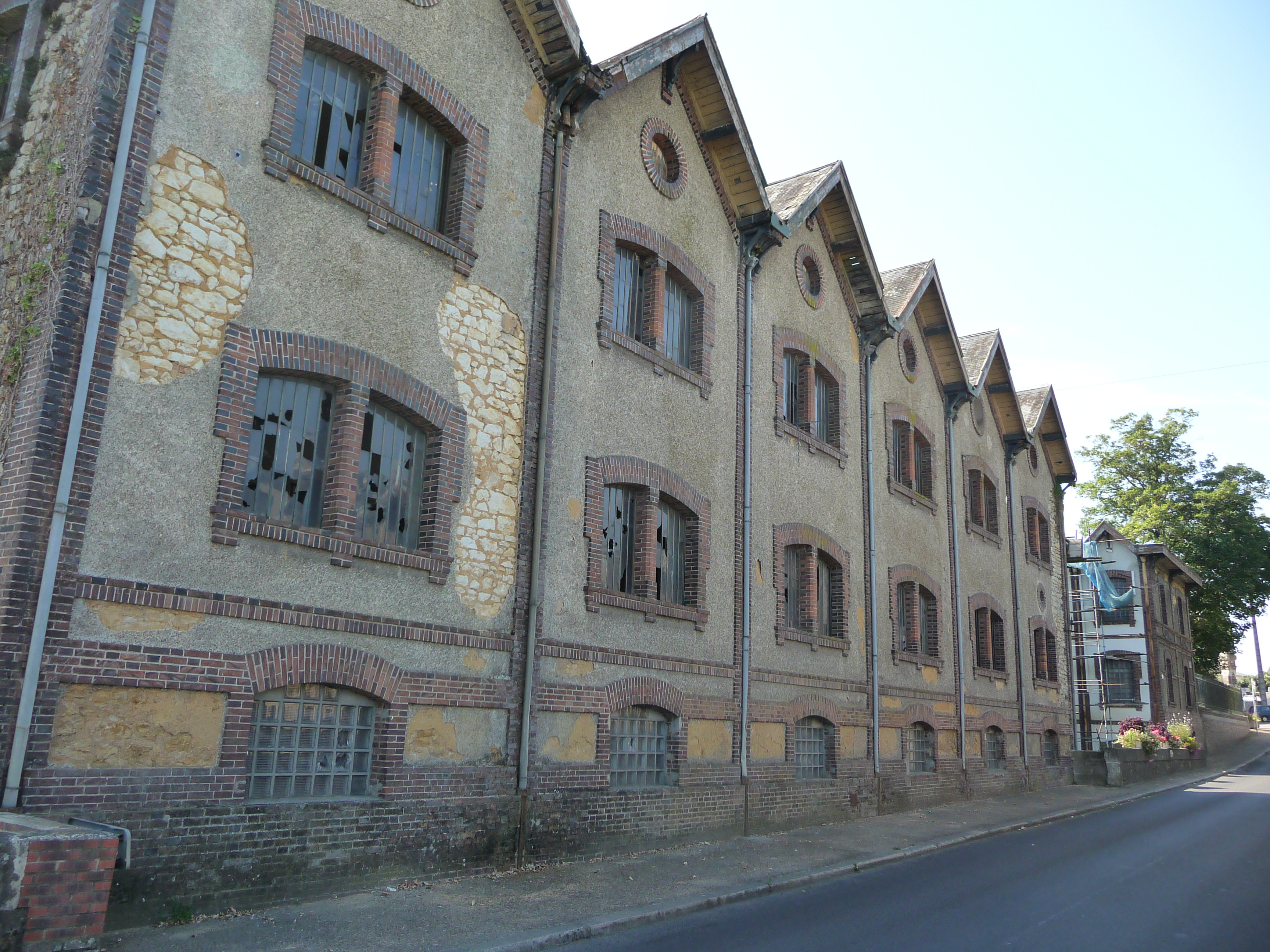 Atelier de fabrication.